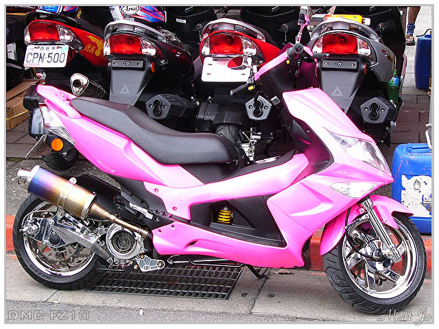 PGO G-MAX Custom